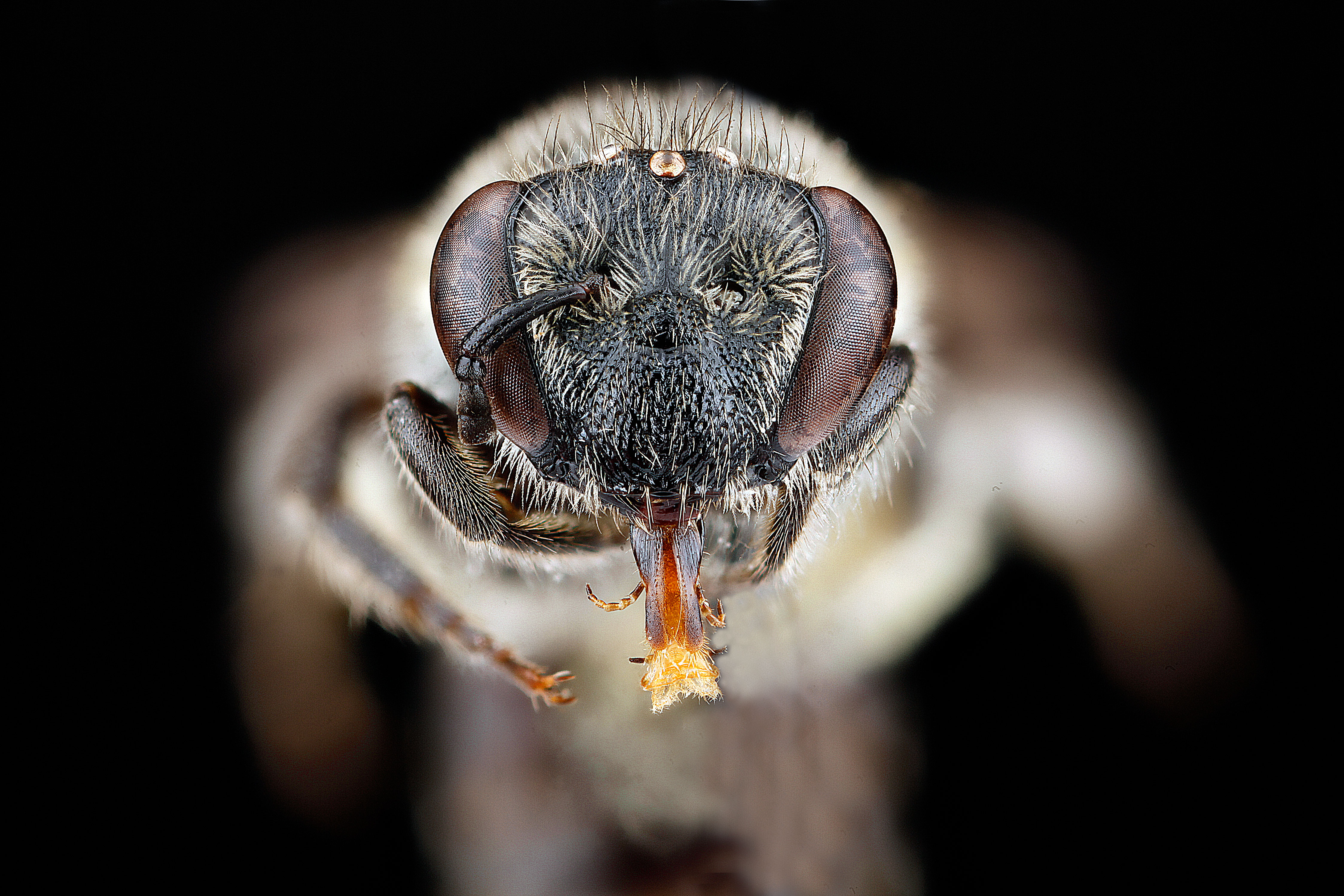 Colletes thysanellae, female